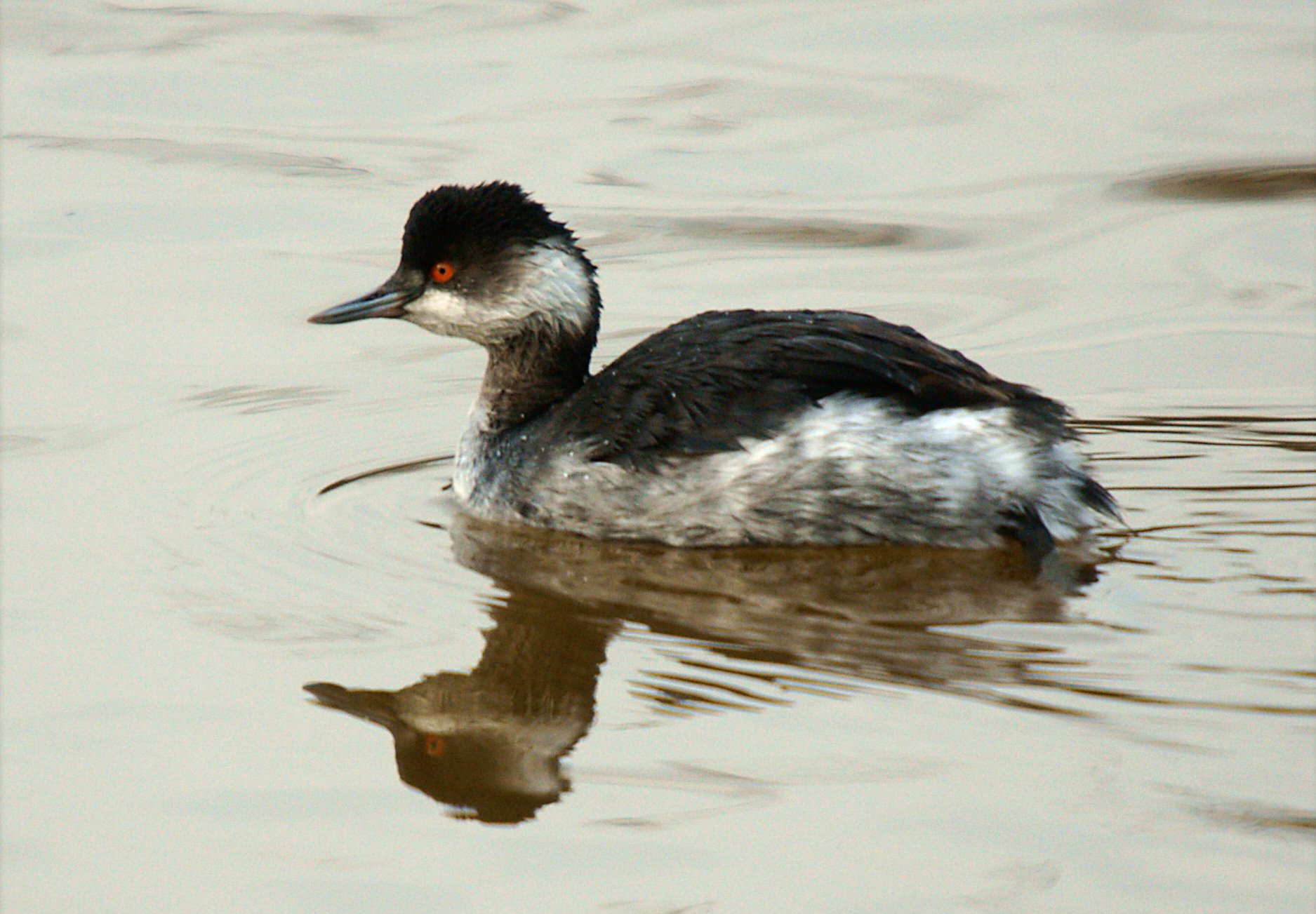 Zampullin cuellinegro - Podiceps nigricollis - Black-necked Grebe - Cabussó coll-negre, Delta de Llobregat, Viladecans, Barcelona, Spain